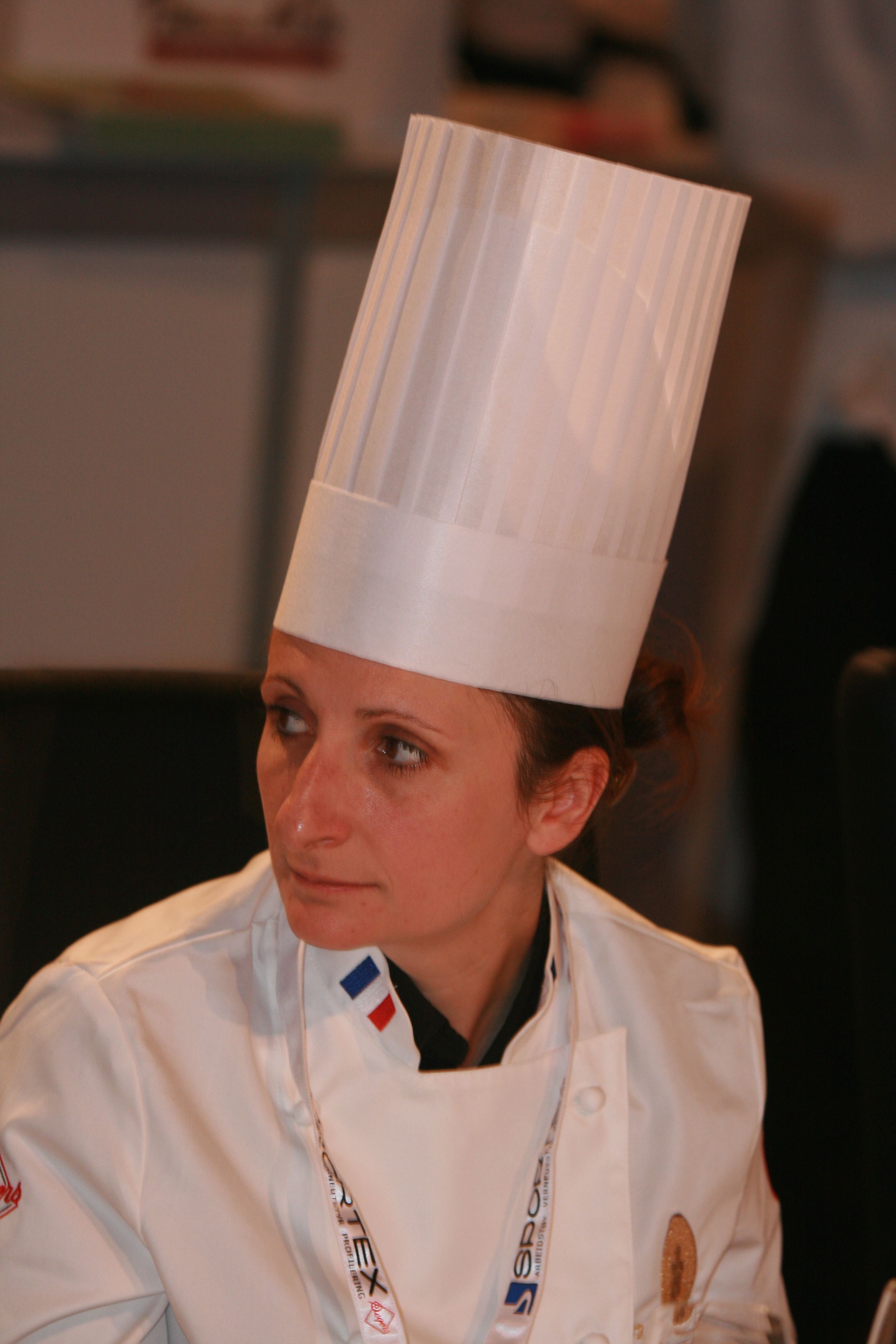 Anne-Sophie Pic under Bocuse d’Or Europa 2008 i Stavanger